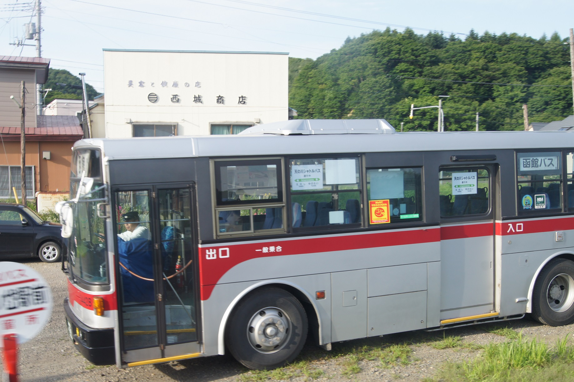 湯ノ岱駅とja:天ノ川駅を結ぶ臨時バス（湯ノ岱駅にて撮影）